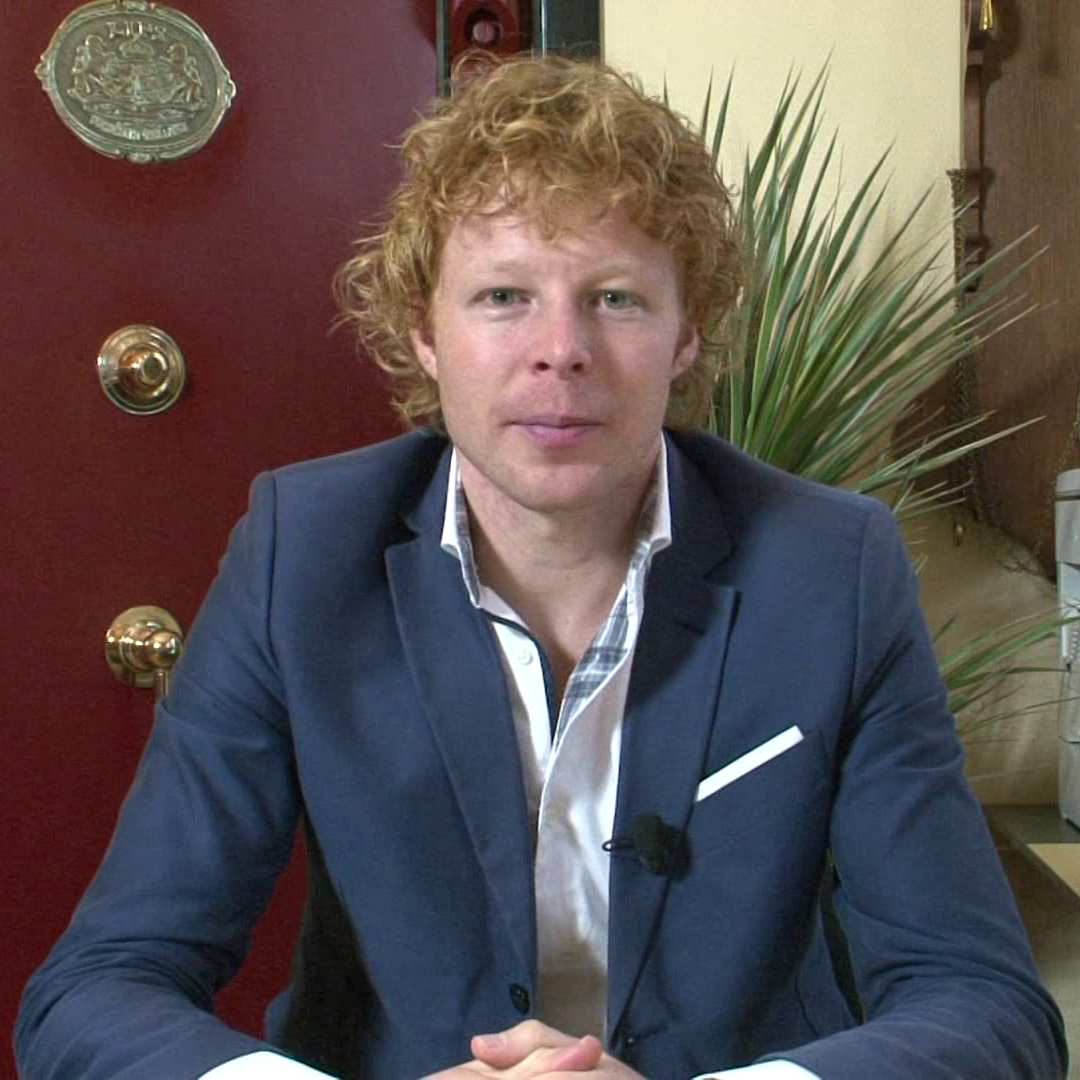 Screenshot uit de video "Ben Woldring - algemene neiging".